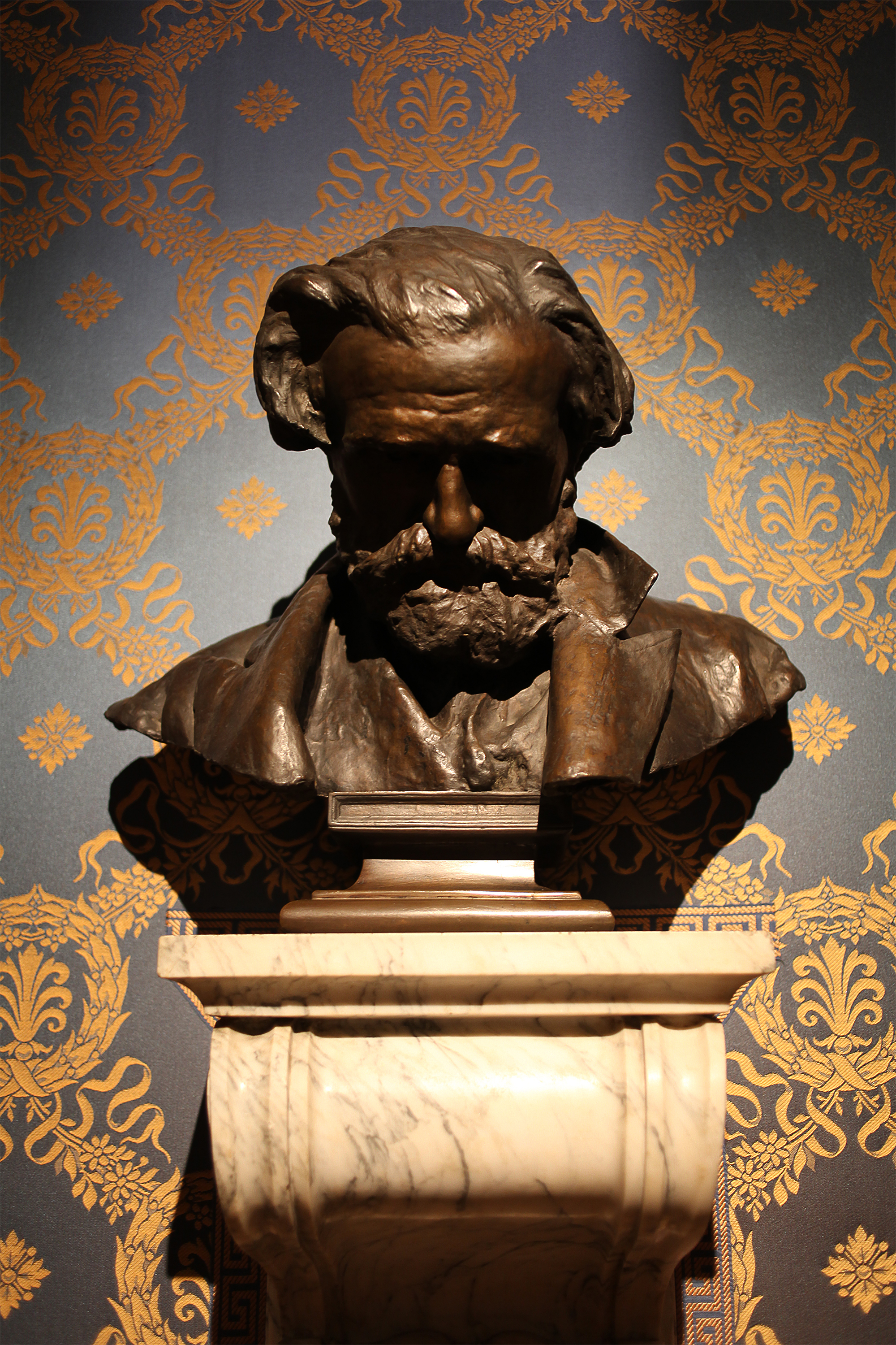 Vincenzo Gemito (1852-1929) Busto di Giuseppe Verdi (1874), Museo della Scala di Milano, collezione Sambon. Copia bronzea di un originale in terracotta conservato a Villa Verdi